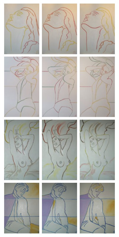 Zwölf Jahreszeiten, Öl auf Leinwand, 6 Stk 70cm x 100cm 6 Stk 70cm x 120cm